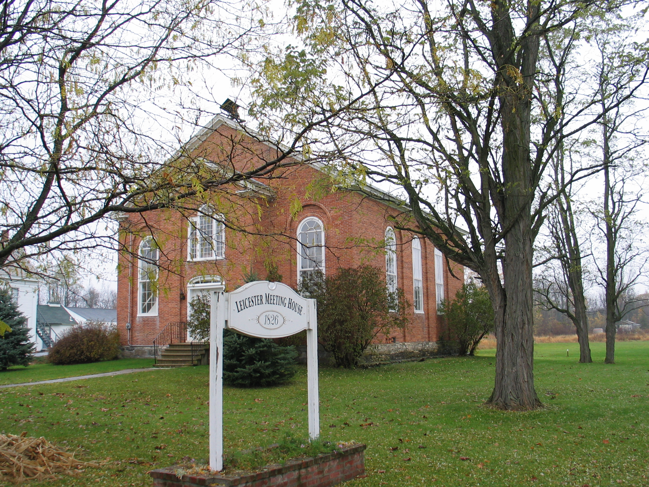 Meeting House, Leicester, Vermont